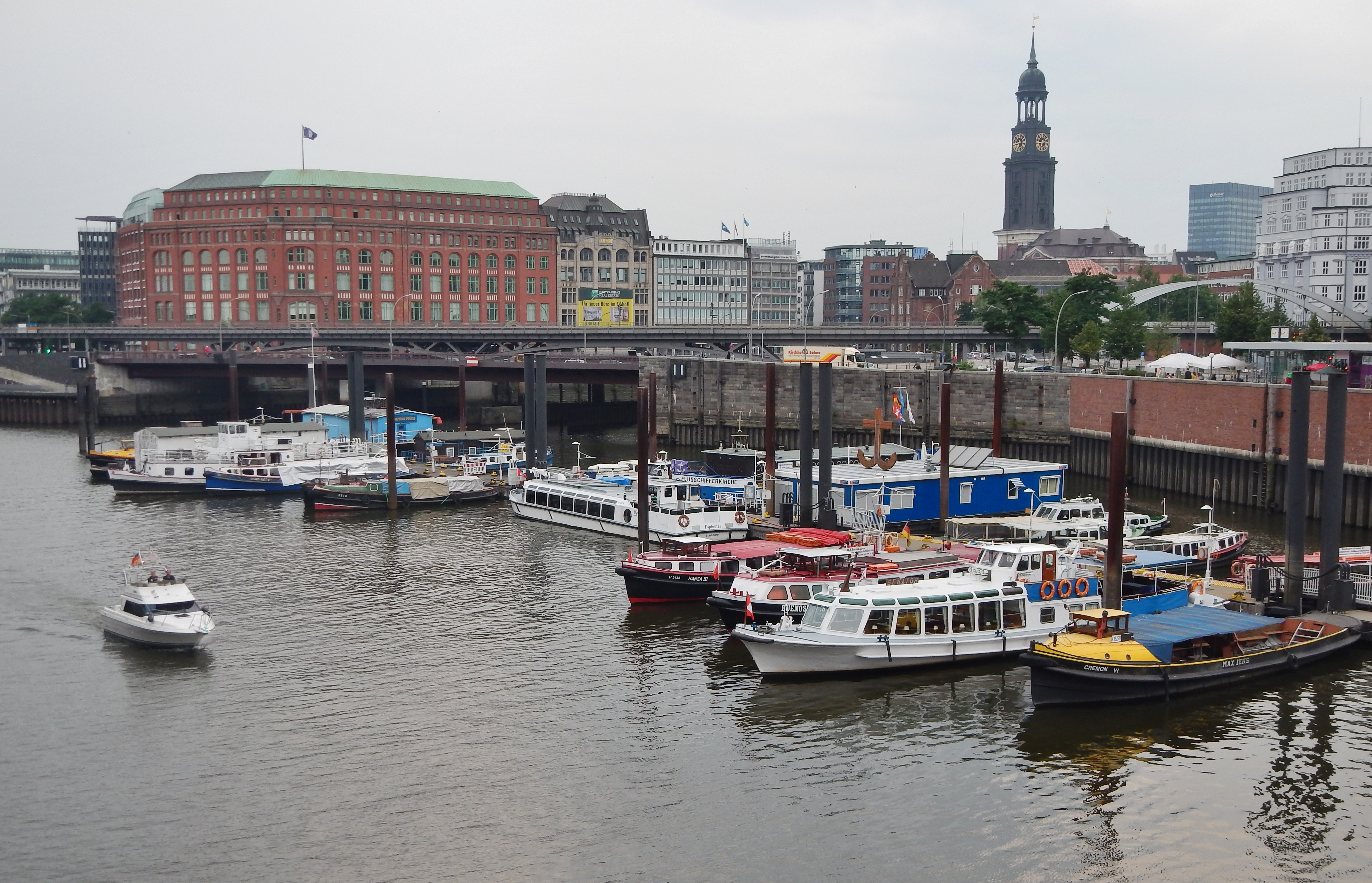 Hamburger Hafen mit Blick zum Michel